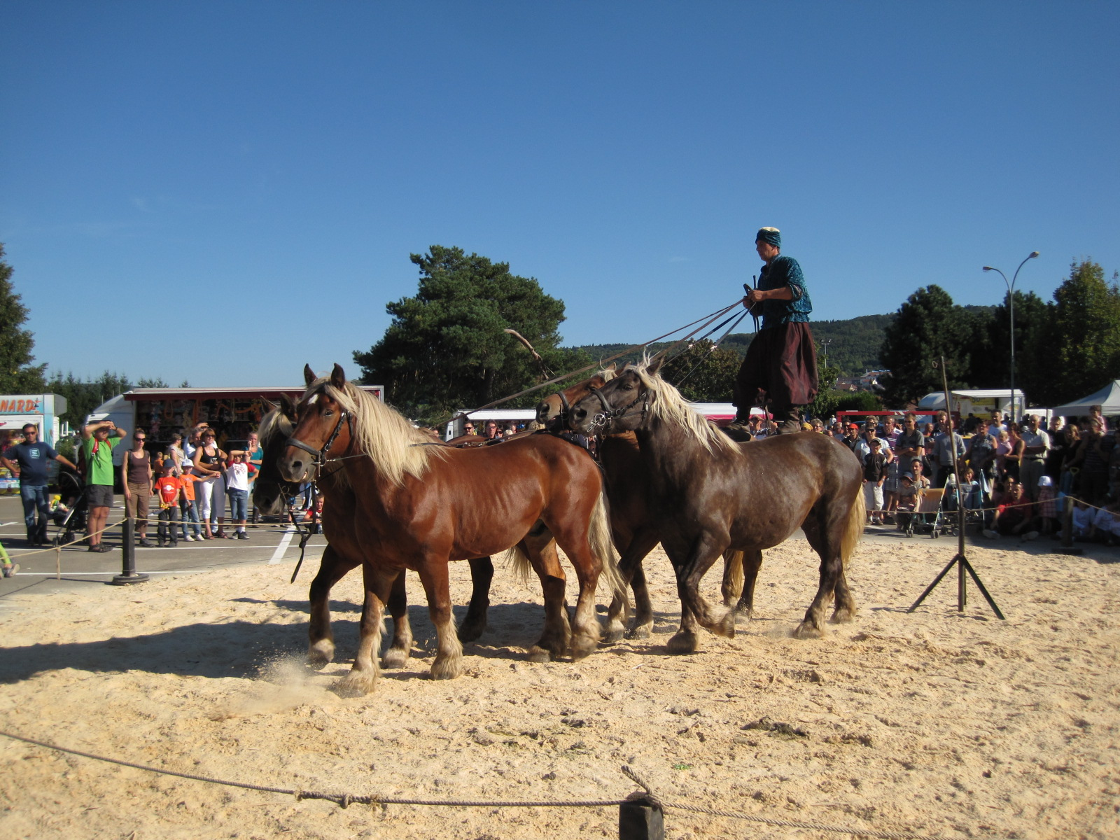 Comtois horse